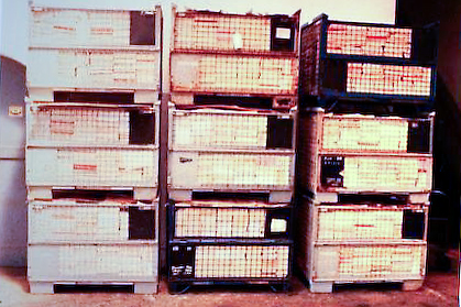 Alte Buchfahrpläne in Gitterboxen